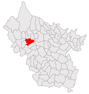 Categorie:Hărţi ale judeţului Buzău